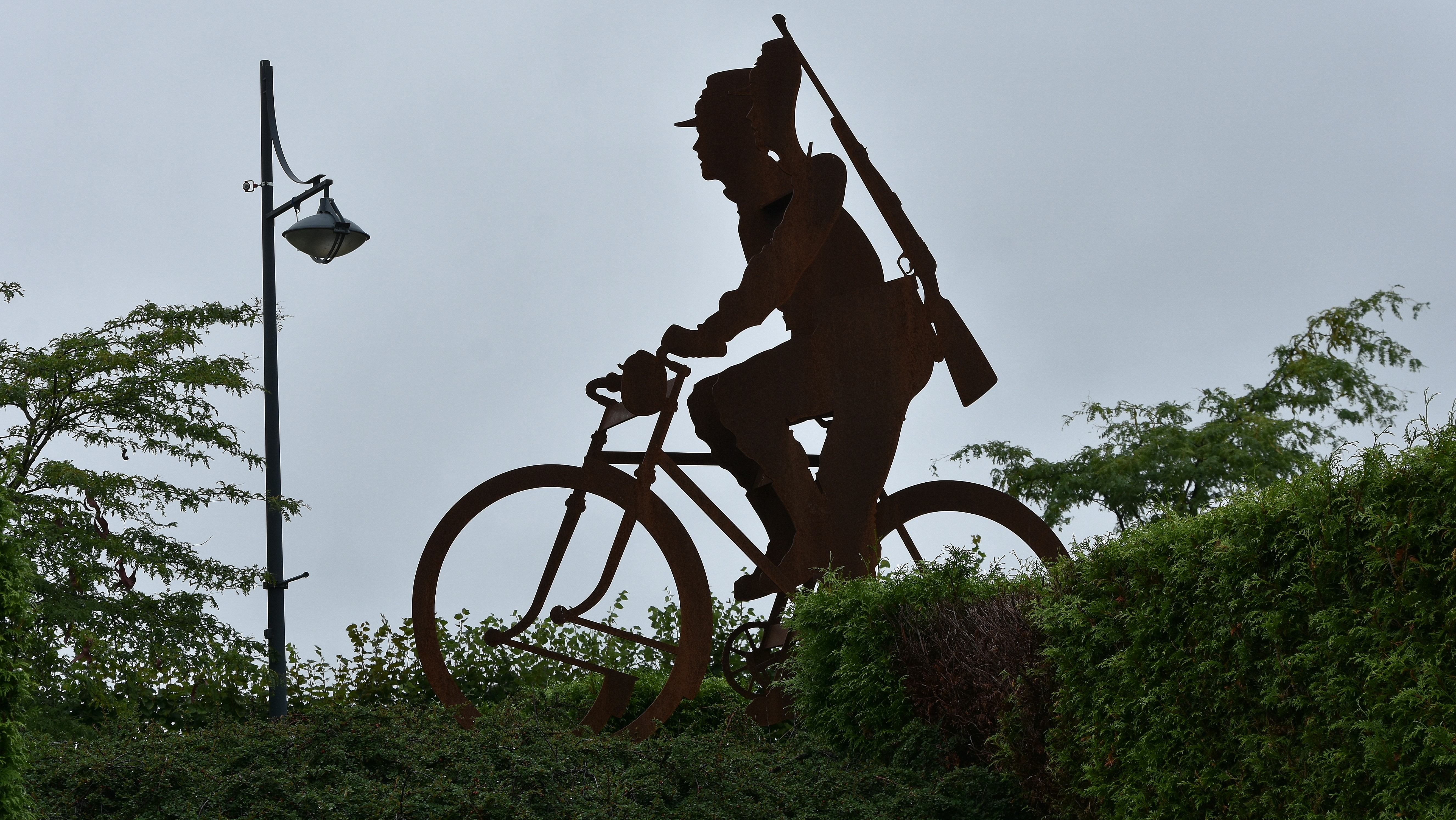 Cyclist (ontwerp Peter Frison) Halen 18-08-2019 This photo of immovable heritage has been taken in the Flemish Region